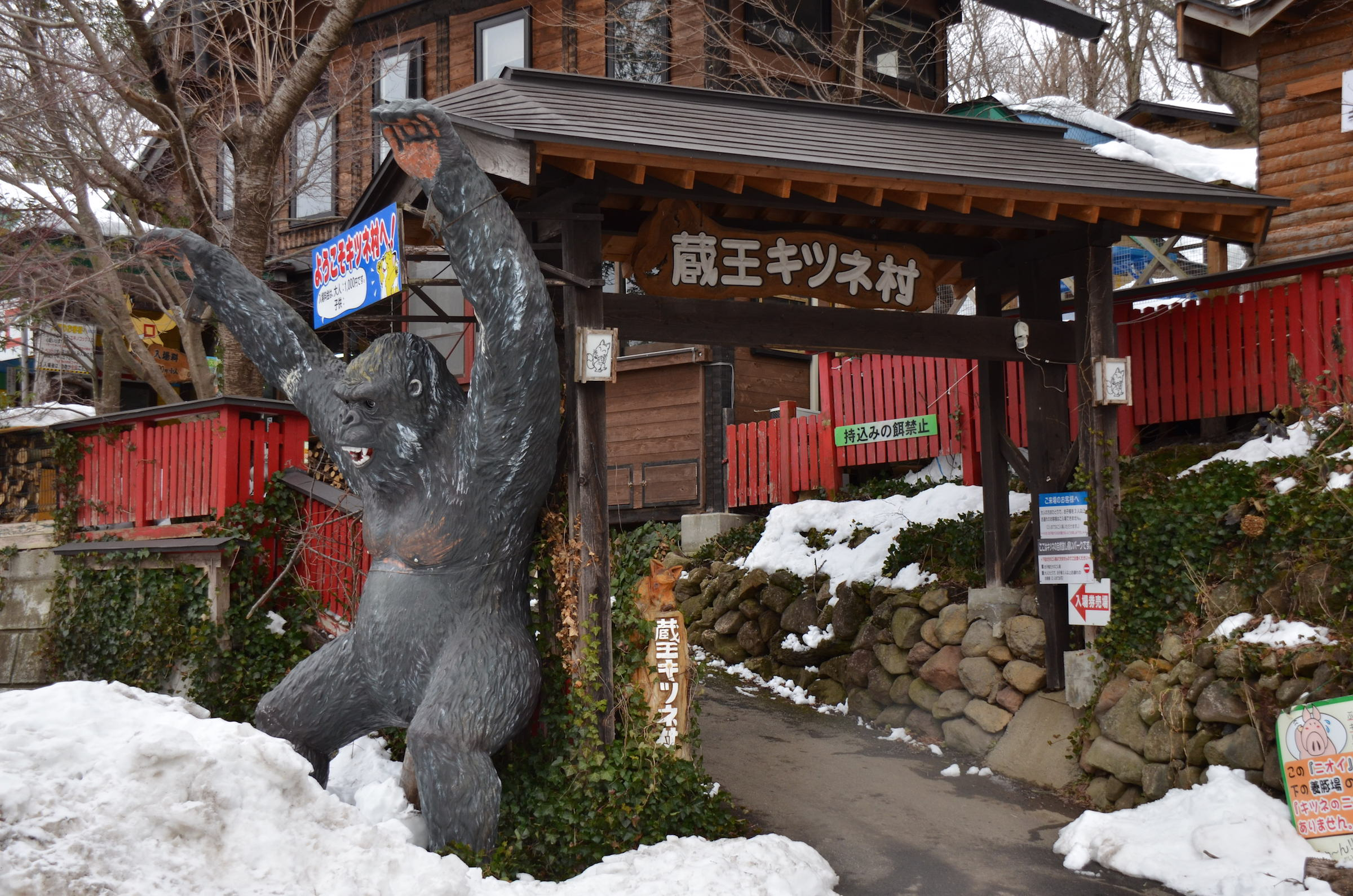 蔵王キツネ村入口、平成26年12月13日撮影